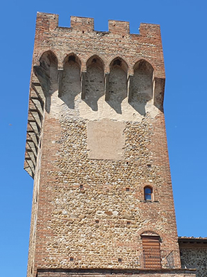 La facciata della Torre dei Frescobaldi